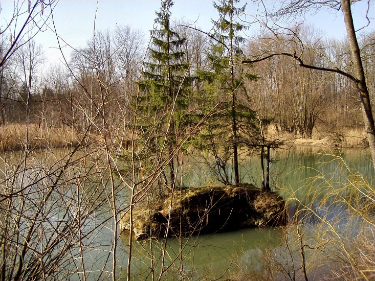 Entenstein im Naturschutzgebiet Fischlhamerau